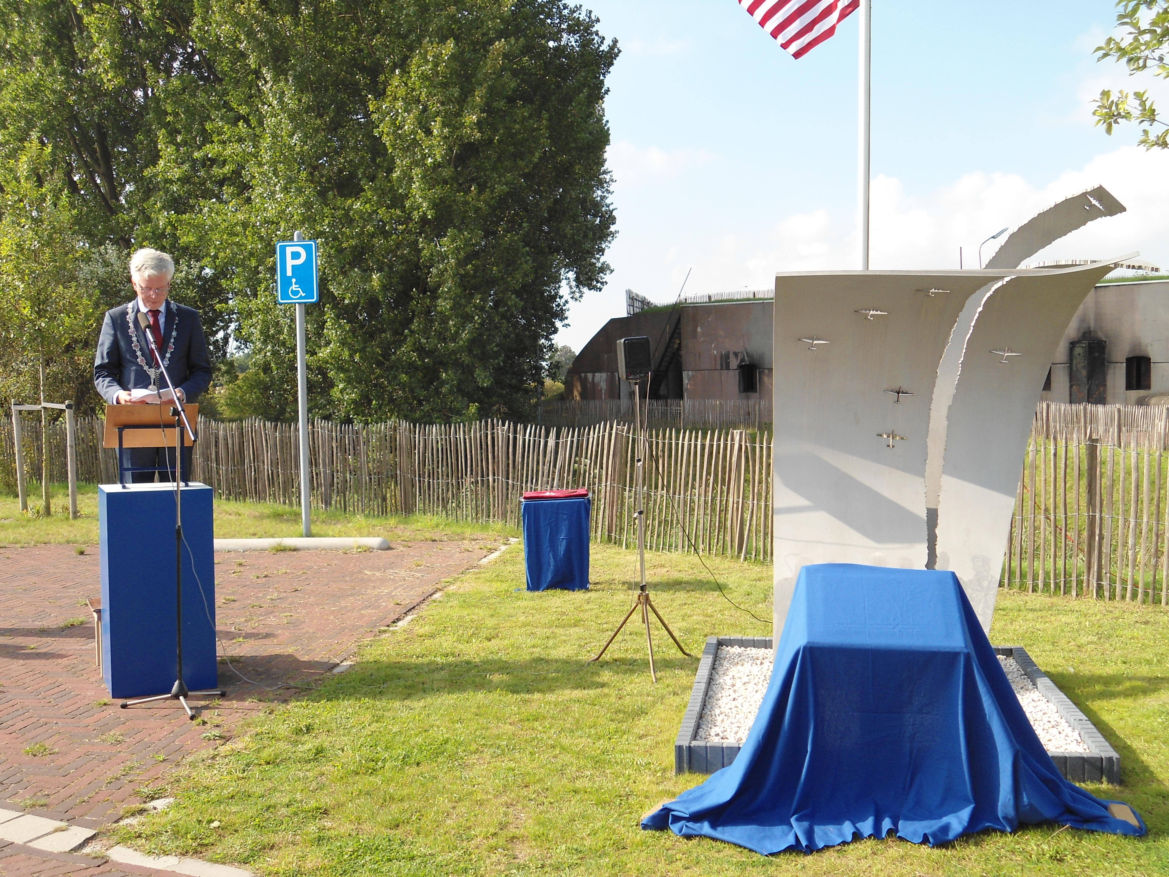 Theo Weterings bij de onthulling Missing Man Salute memorial Air Crash Museum 40-45 op 13 september 2014 in Rijsenhout